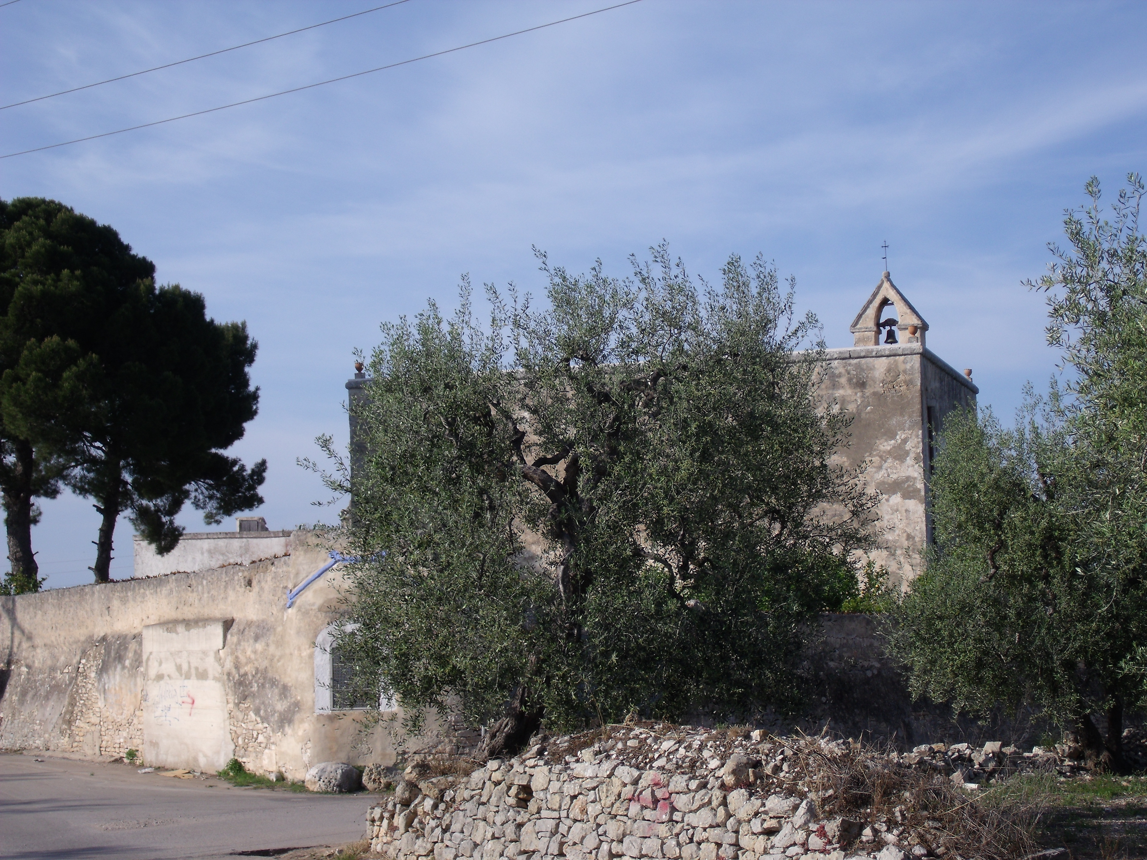 Casale